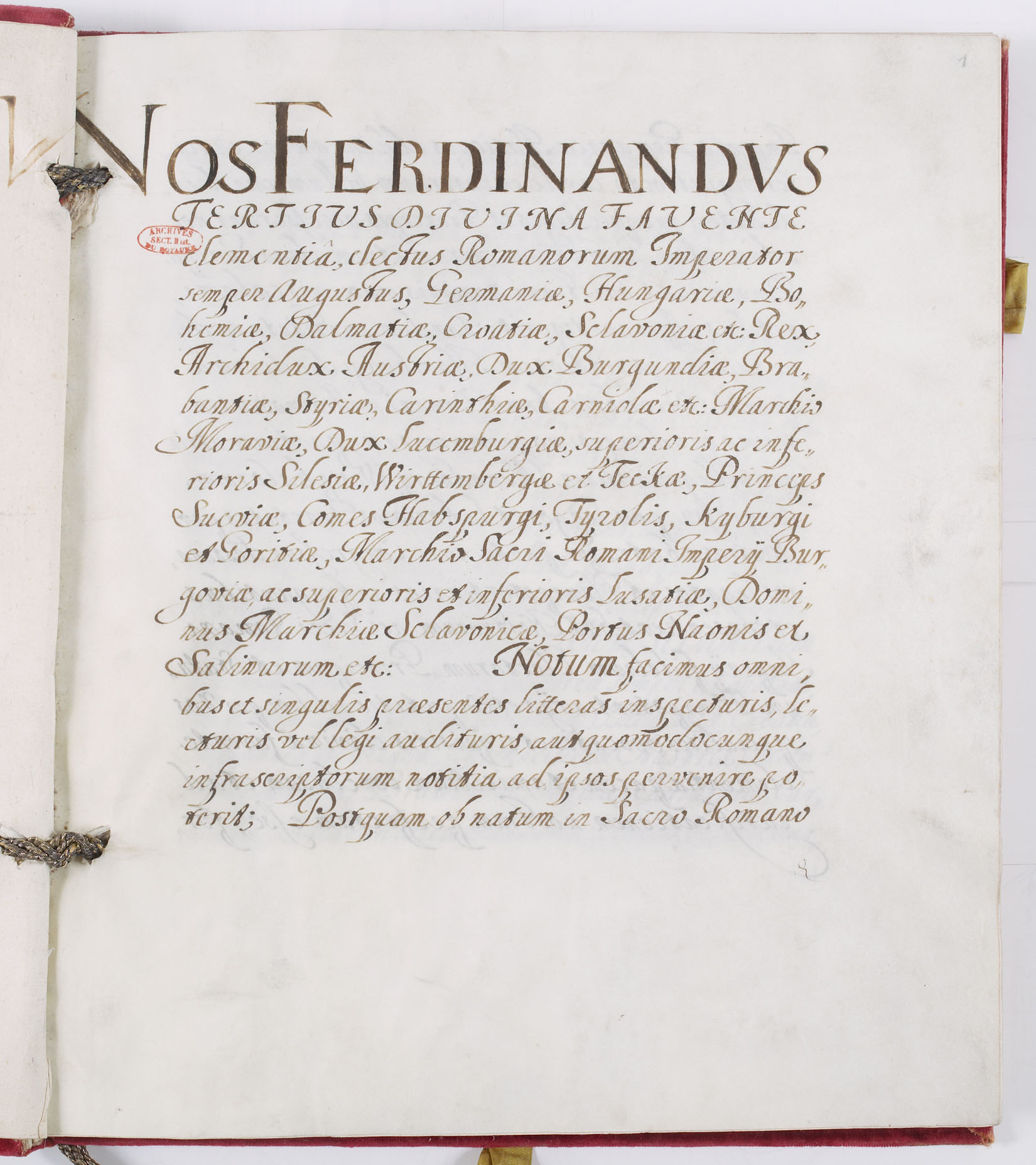 Expédition solennelle du traité de paix de Münster, faite à Vienne par l'empereur Ferdinand III. Ce traité est l'un des traités de Westphalie qui mettent fin à la guerre de Trente Ans.